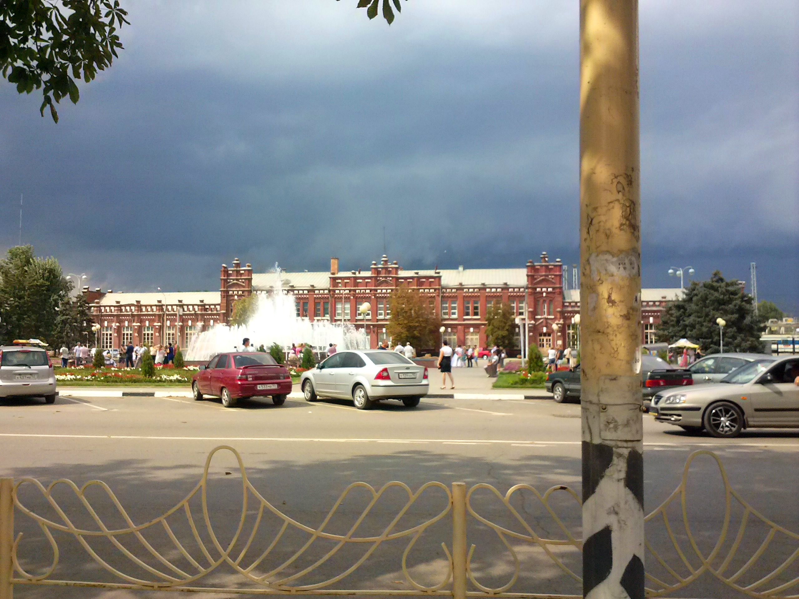 Здание железнодорожного вокзала 1903 года постройки.